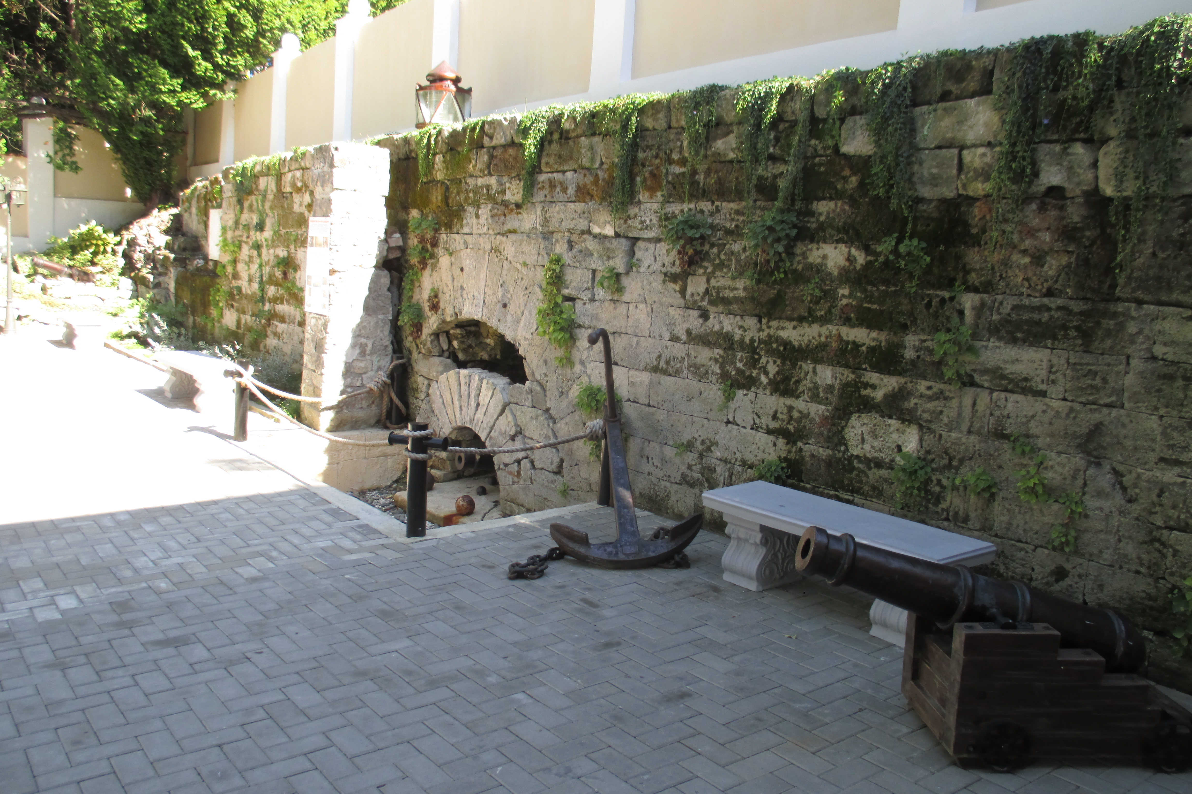 Остатки крепостной стены с выездными воротами Навагинского укрепления, построенного по указанию адмирала М.П. Лазарева: улица Москвина, 7 (во дворе 1-ой городской поликлиники), Центральный район, Сочи, Краснодарский край